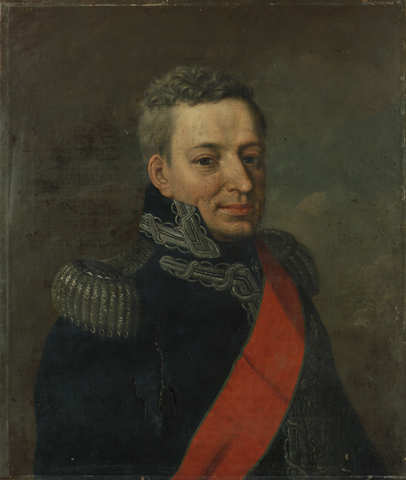 Brustbild in schwarzblauer Uniform mit silbernem Spiegel und rotem Ordensband mit grüner Einfassung des herzoglich-sächsischen Ernestinischen Hausordens. Victor Amadeus Landgraf zu Hessen-Rotenburg (1779-1834), seit 1812 regierender Landgraf, erhielt 1814 den Orden eines Ritters des kurhessischen Löwenordens und führte seit 1820 auch den Titel Herzog von Ratibor und Fürst von Corvey.